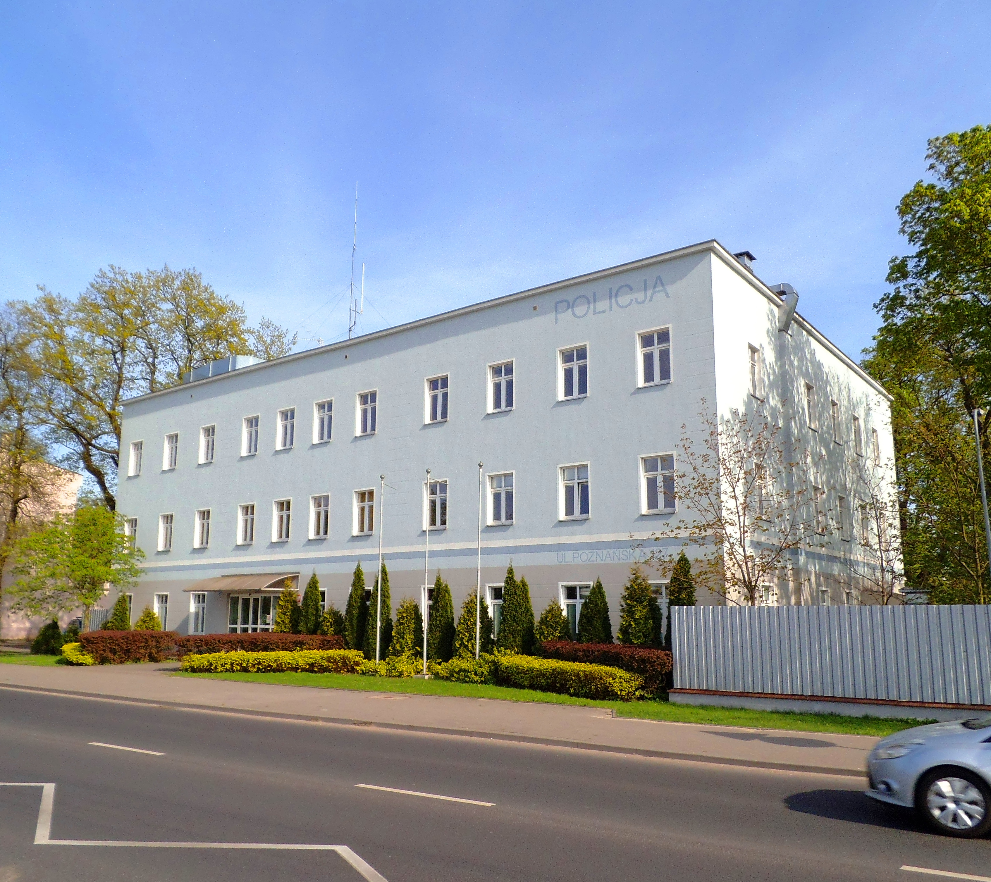 Komisariat Policji – Toruń Podgórz